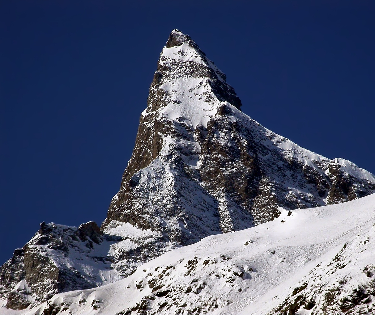 Monti la Gran Rousse Rhemes Notre Dame - Alpi Graie - Italy